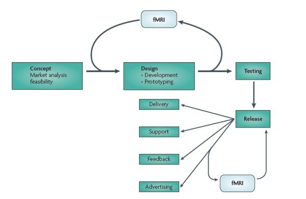 Иллюстрация возможностей применения нейромаркетинга (фМРТ) в цикле развития продукта. Первый вариант — на стадии дизайна, когда анализ нейронных реакций используется для создания более точного образа будущего продукта. Второй — после его реализации, когда нейронные реакции исследуются для оценки эффективности рекламной кампании и повышения продаж.